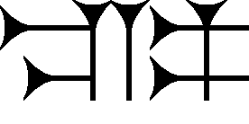 Cuneiform sign